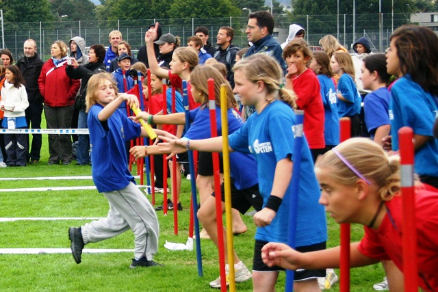 Schweizerische Kadettentage 2008 Winterthur Stafette